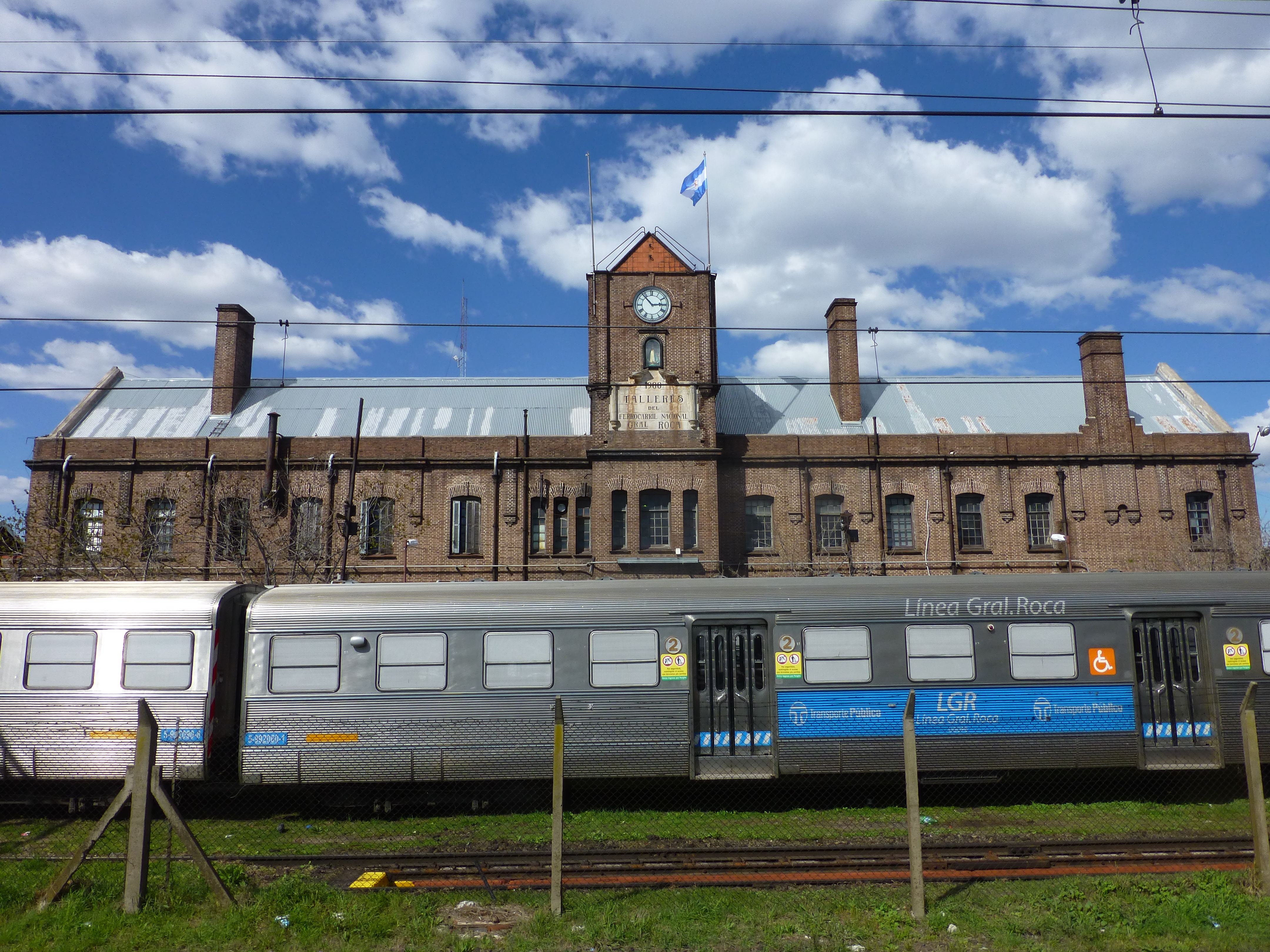 Vista desde el andén de la estación de los Talleres Ferroviarios de Remedios de Escalada.